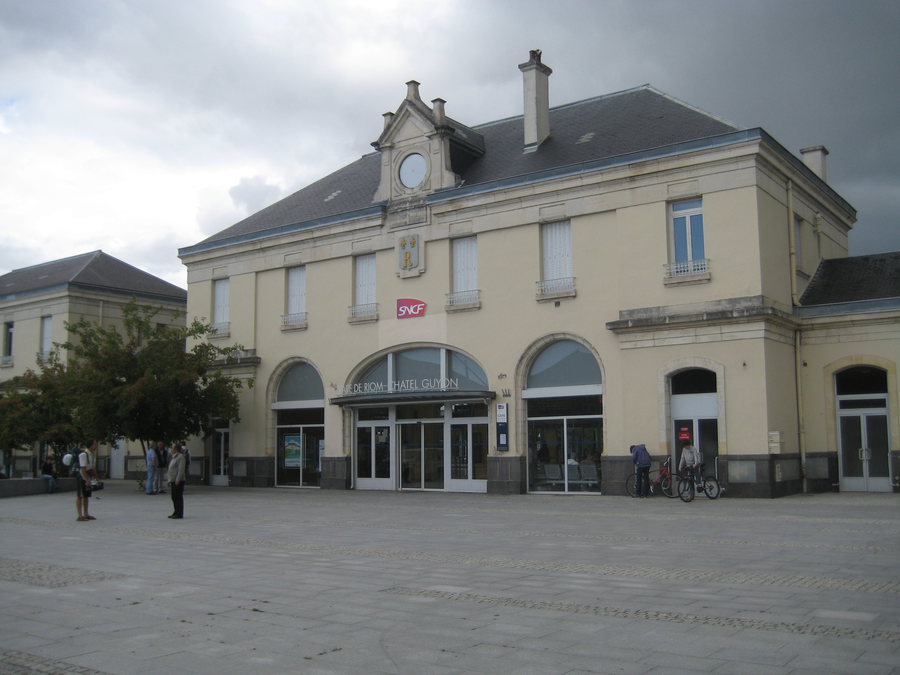 Gare de Riom-Châtel-Guyon, 2011